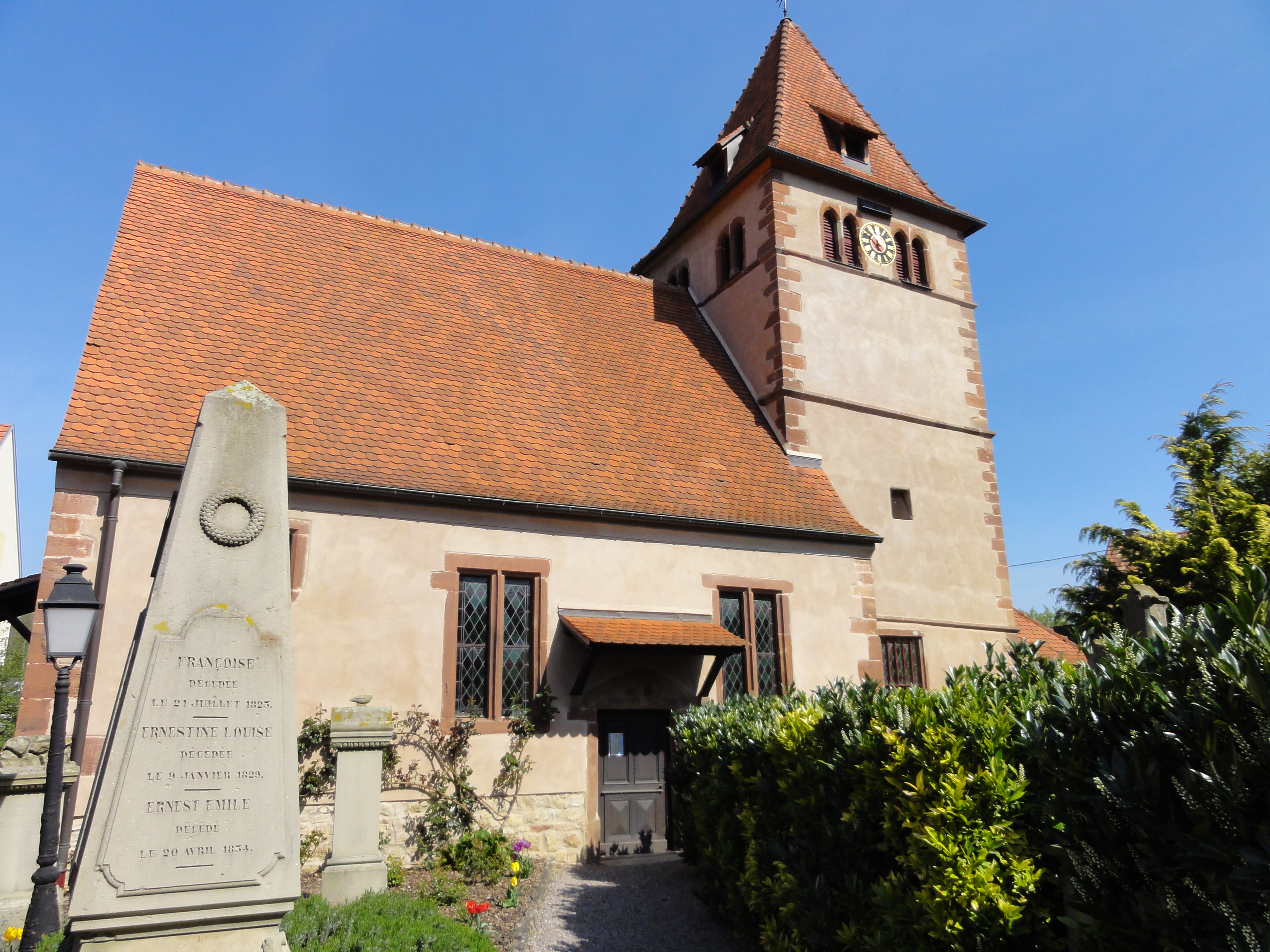 Alsace, Bas-Rhin, Wintzenheim-Kochersberg, Église protestante (XIVe-XVIe-XVIIIe)